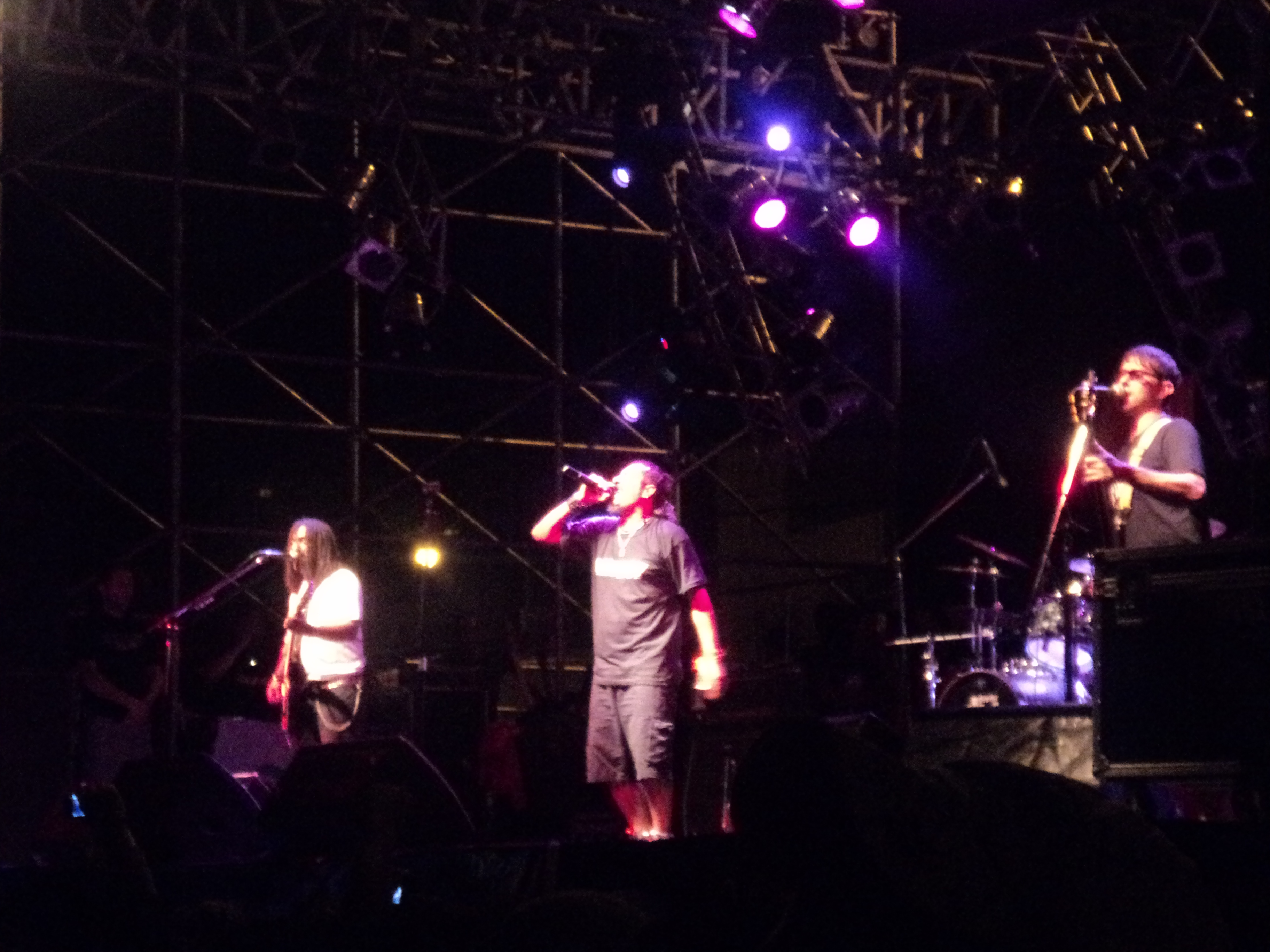 la banda tocando en vivo en comodoro